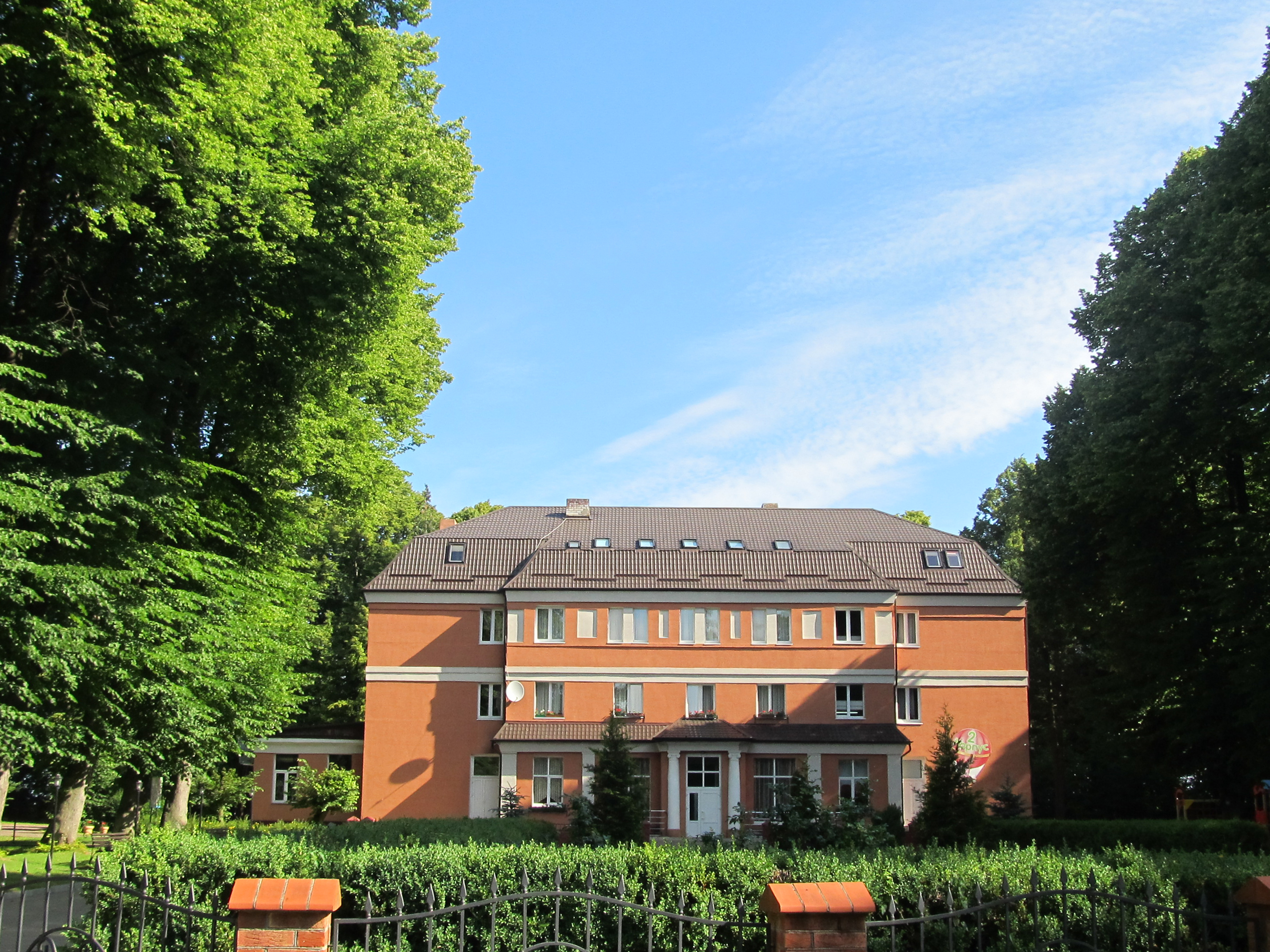 2-й корпус детского санатория «Отрадное» ГУ Минздрава РФ, располагается в бывшем «Курхауз Георгенсвальде» — «Лечебном доме» кёнигсбержского архитектора Отто-Вальтер Кукука